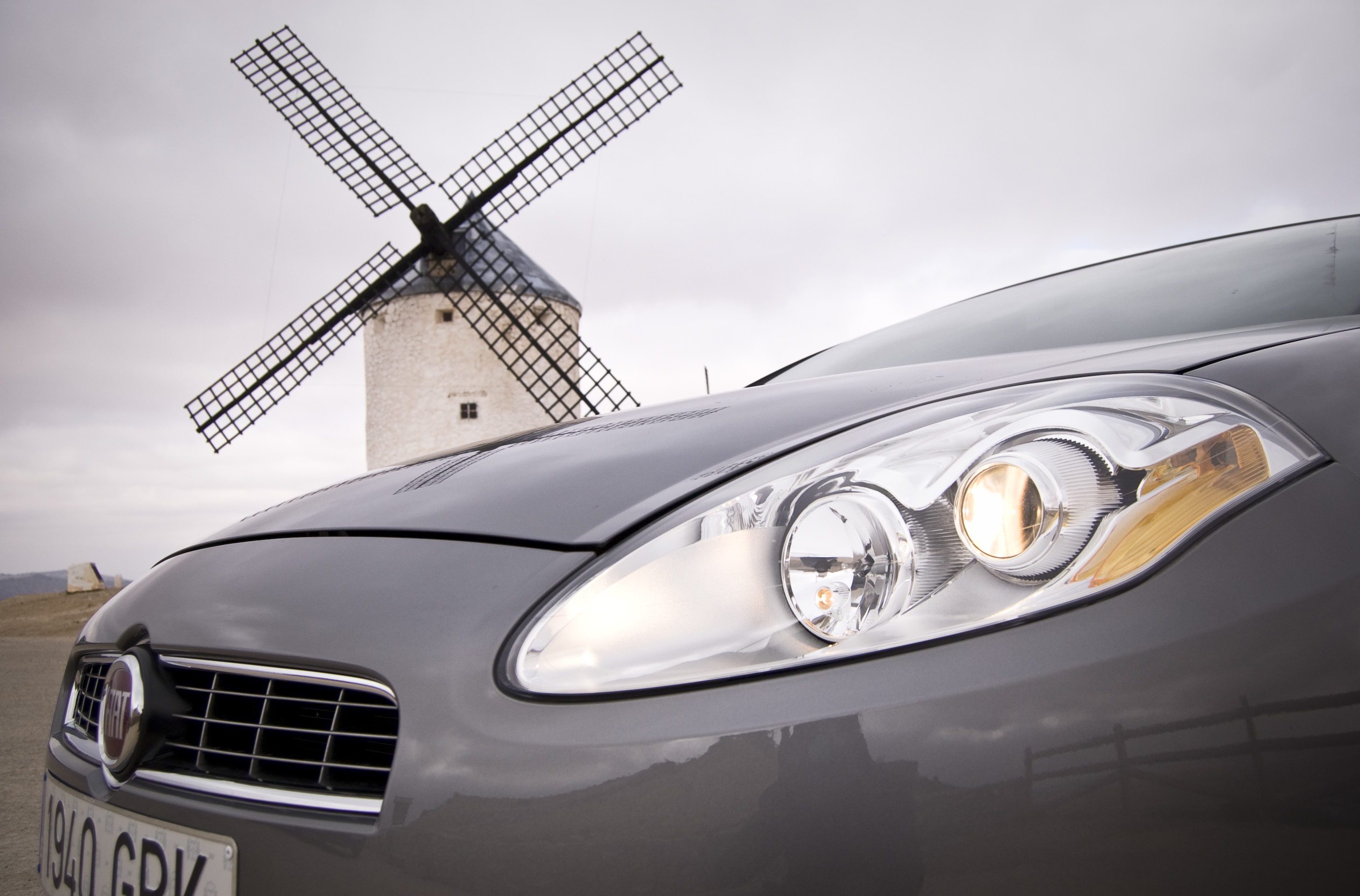 Fiat Bravo prueba y "photoshoot" en los molinos de viento de Consuegra (Toledo). Prueba en Diariomotor